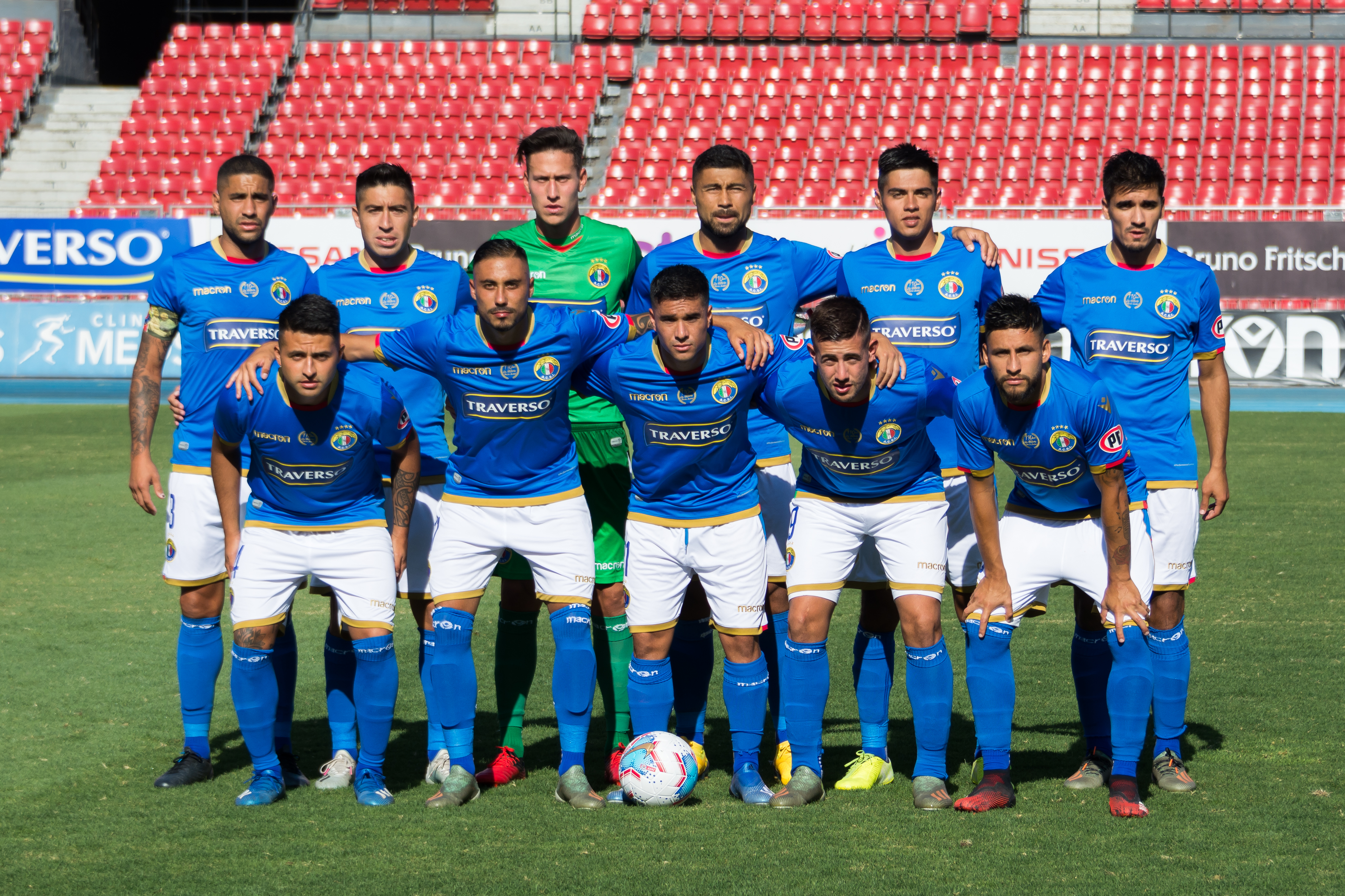 Audax Italiano v Colo-Colo, Estadio Nacional, Ñuñoa, Santiago, Región Metropolitana, Chile